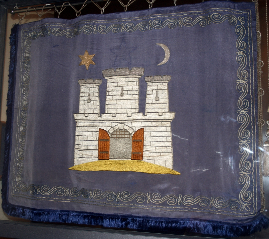 Zastava s grbom grada Zagreba, u Muzeju grada Zagreba snimljen tijekom Noći muzeja